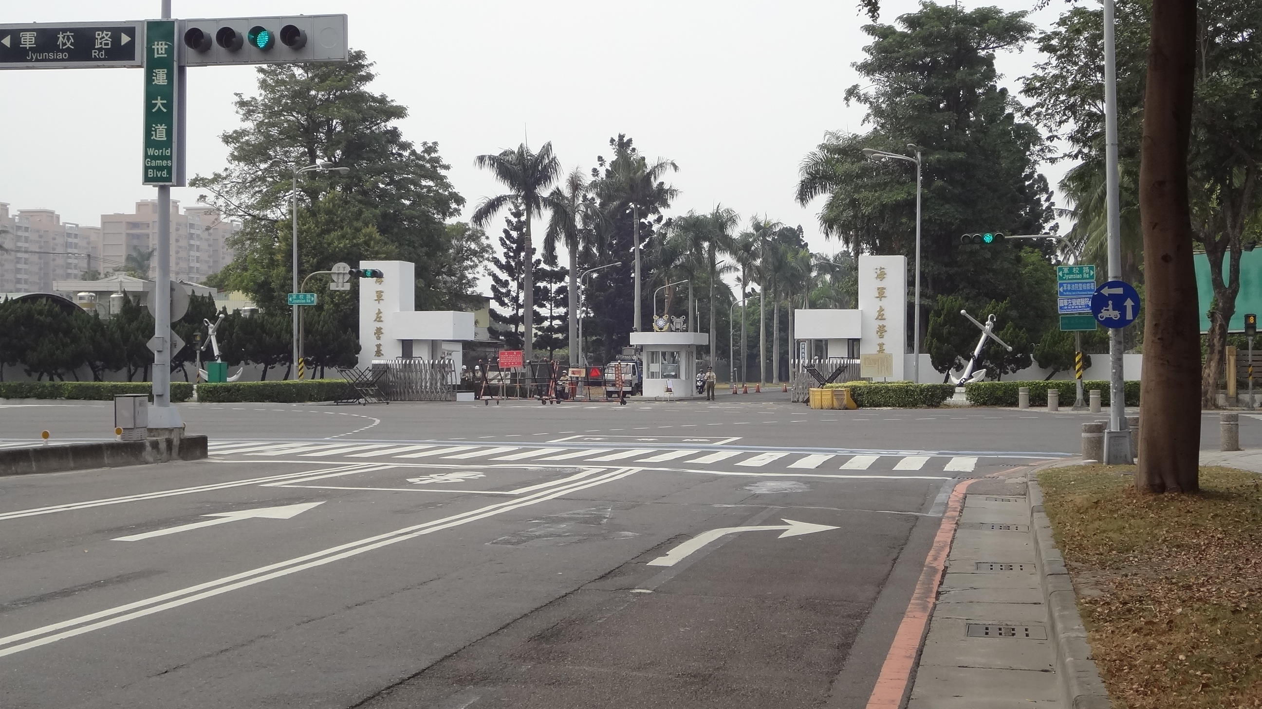 中華民國海軍左營基地中海哨，位於高雄市左營區軍校路與世運大道口，衛哨勤務由憲兵執行。